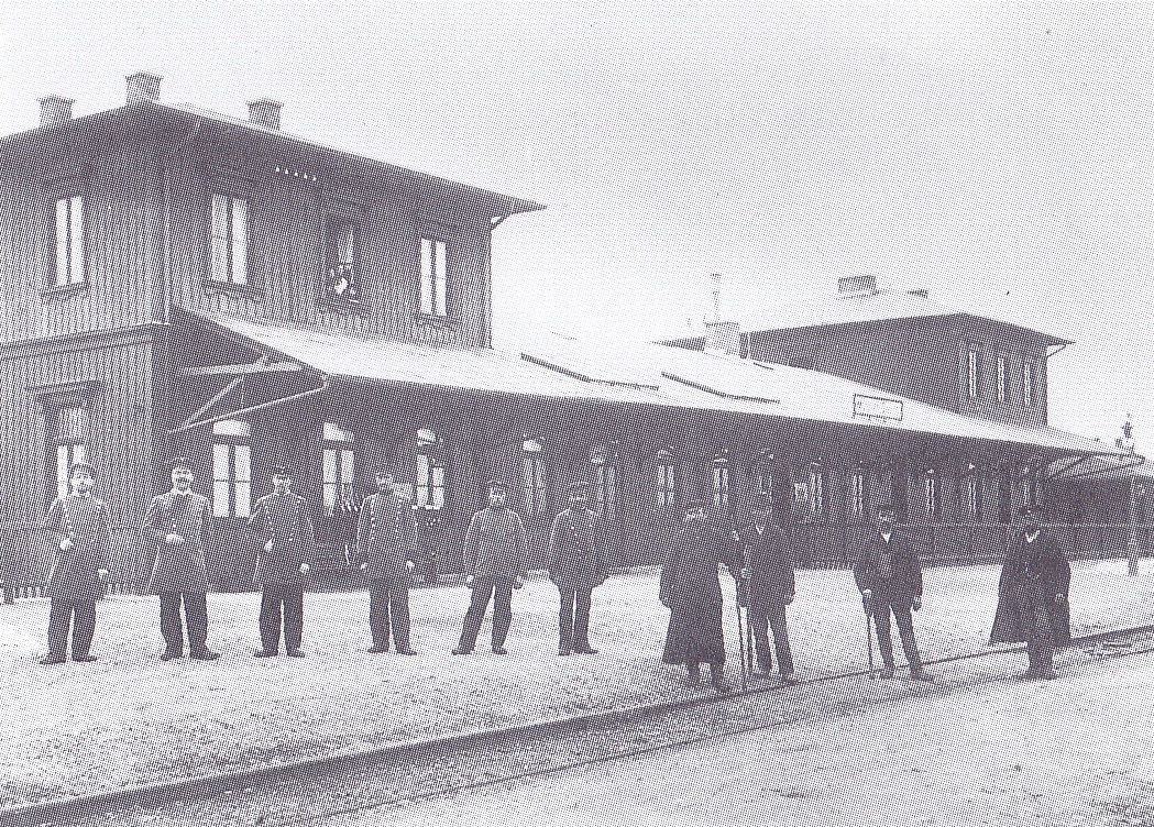 Empfangsgebäude des Bahnhofs Giesing von der Gleisseite